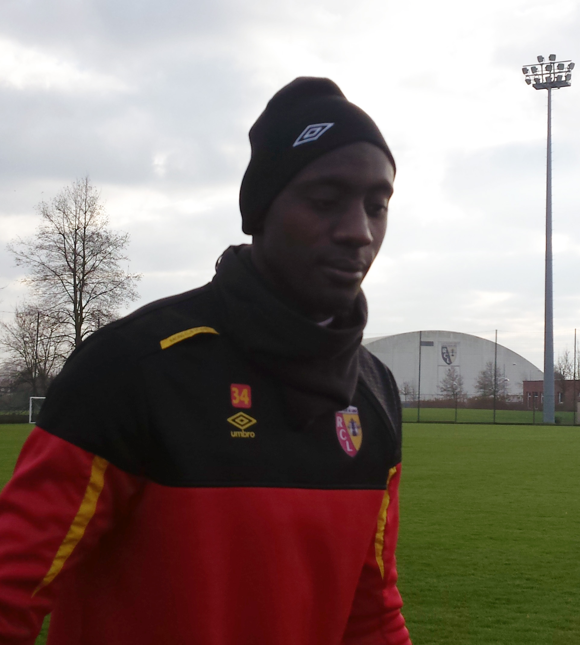 Abdoul Ba après un entraînement public du Racing Club de Lens, le 31 décembre 2014, sur le terrain "San Siro" du Centre Technique et Sportif de La Gaillette